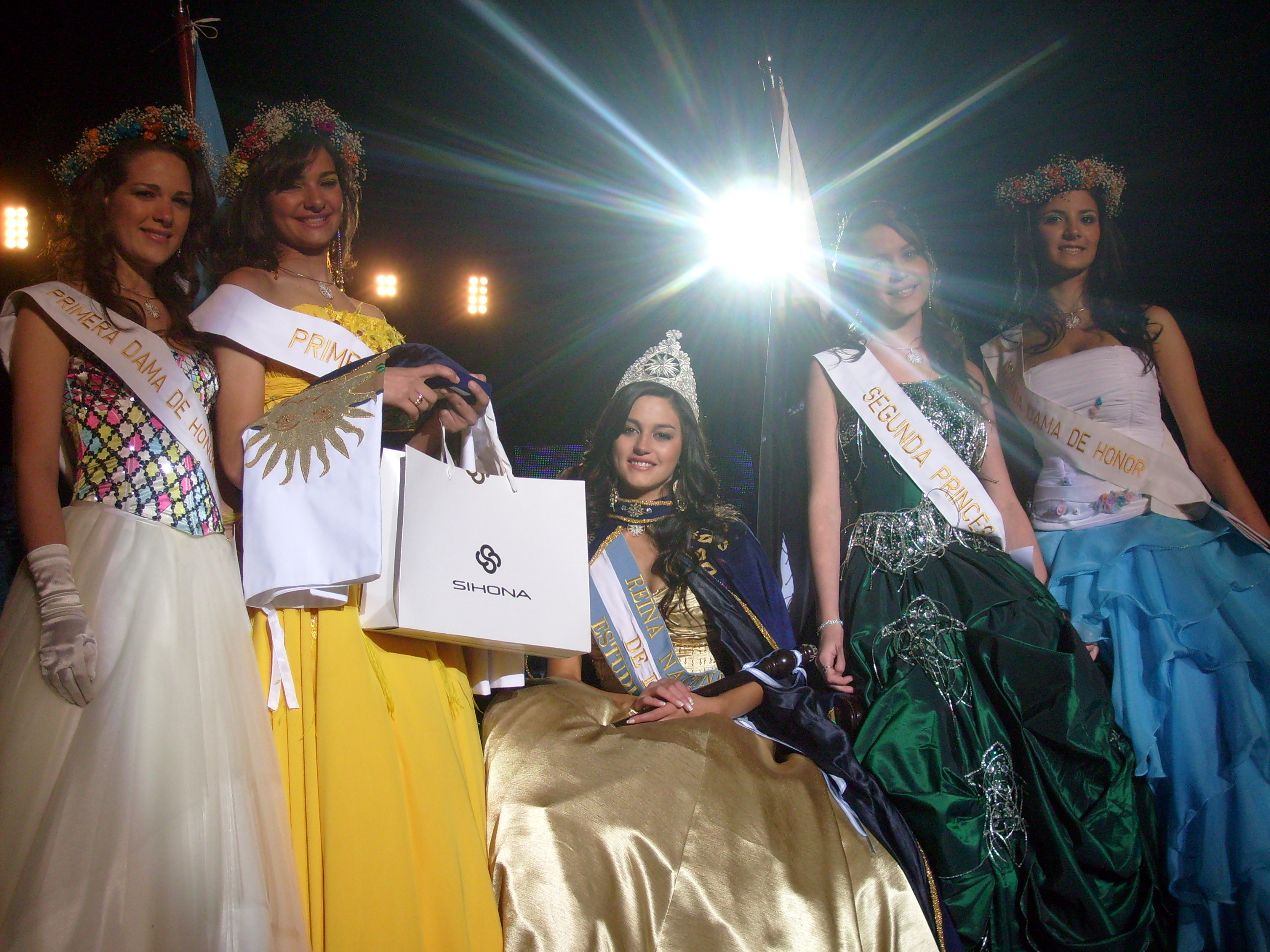 Candidatas electas en la Fiesta Nacional de los Estudiantes, edición 58º.